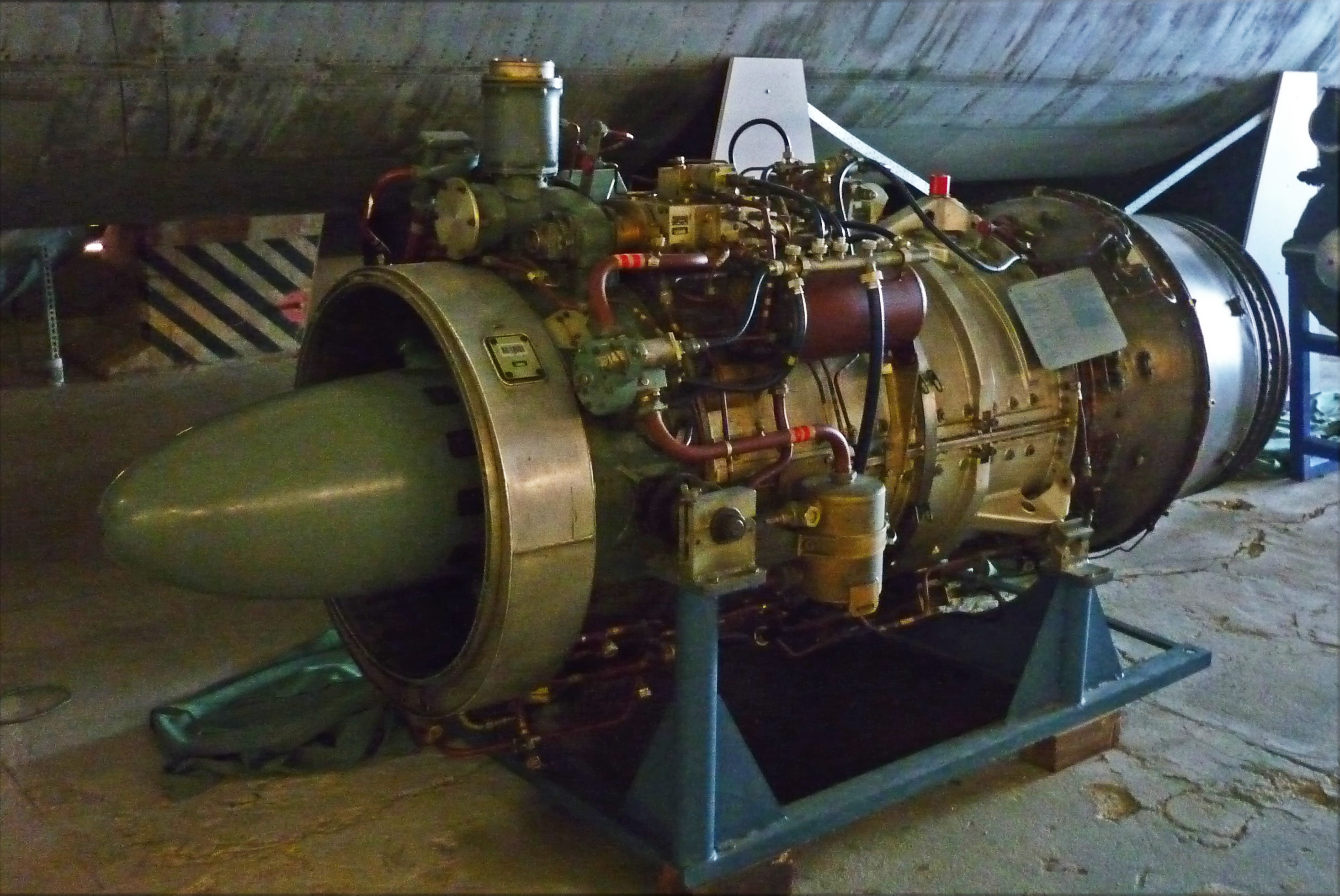 Das Strahltriebwerk Pirna-014 der "152" auf dem Flughafen in Dresden-Klotzsche